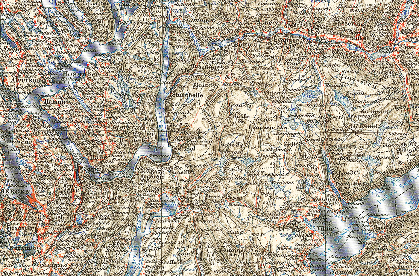 Kart over gamle Vossebanen